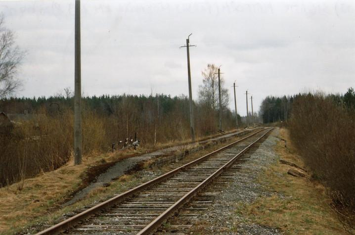 Sigaste raudteepeatus, kevad 2005.